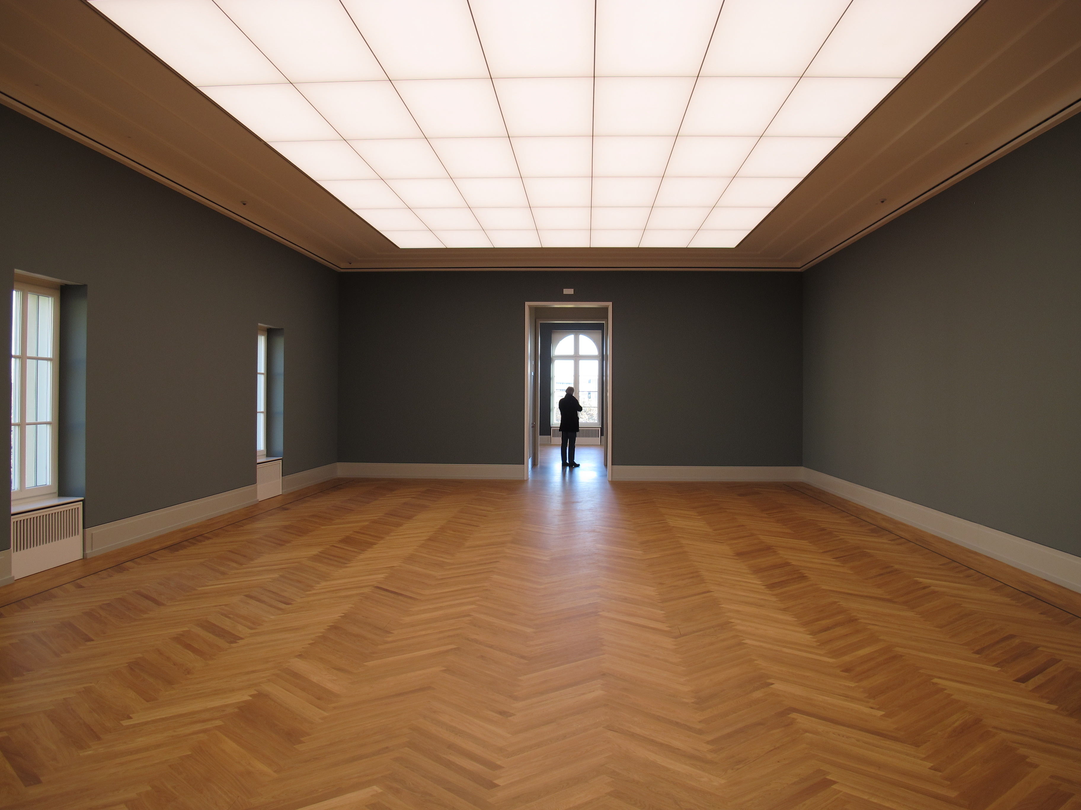 Ein zukünftiger Ausstellungsraum des Museum Barberini in Potsdam. Das Museum war für einige Tage im November 2016 kostenfrei zugänglich, noch ohne Kunstwerke.